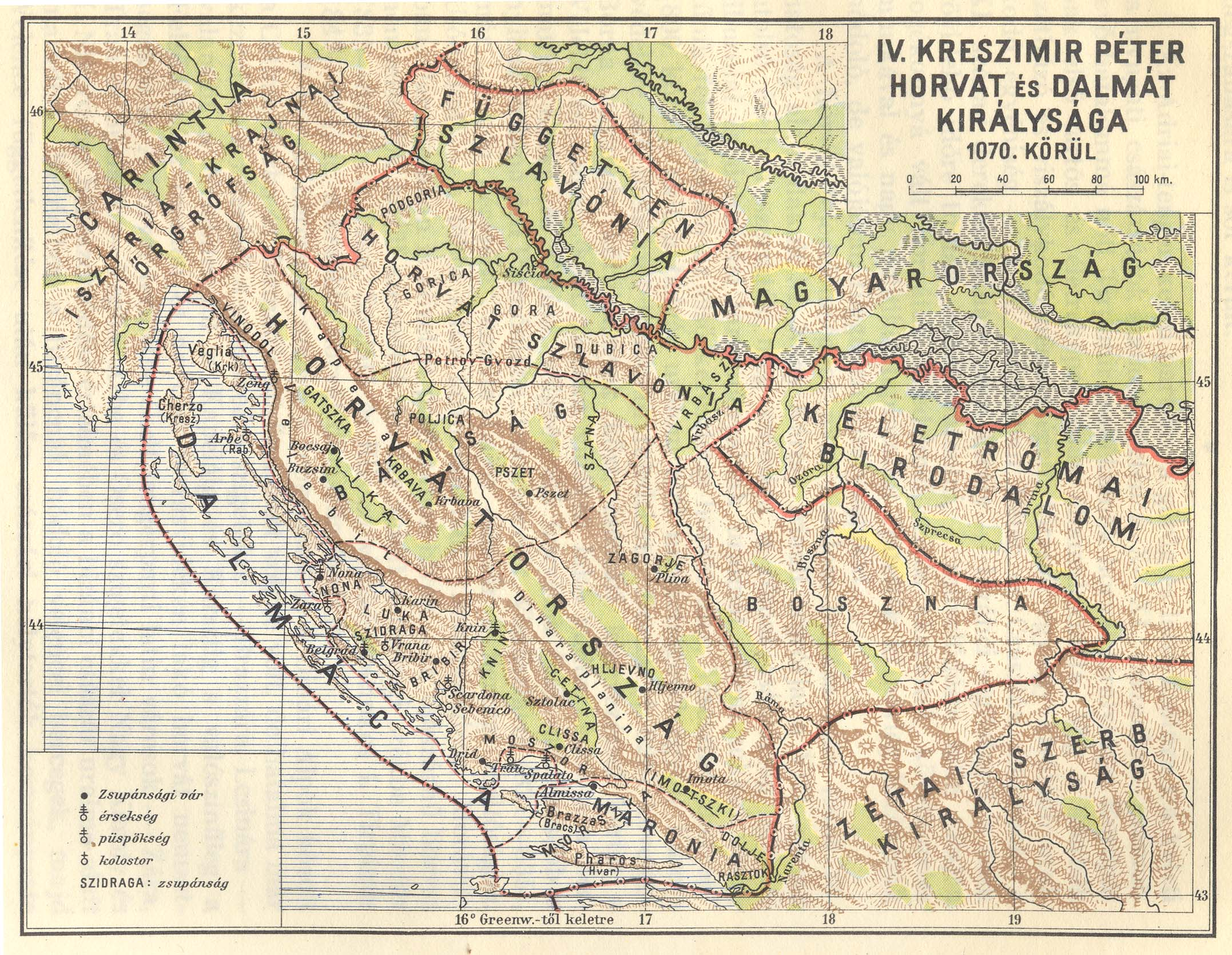 IV. Kreszimir Péter horvát és dalmát királysága 1070. körül. in: Hóman Bálint MAGYAR TÖRTÉNET. Budapest, 1928, Királyi Magyar Egyetemi Nyomda